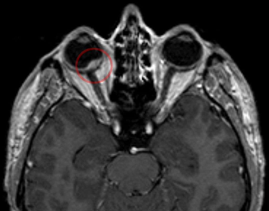 Aderhautmelanom in der Kernspintomographie T1 KM axial